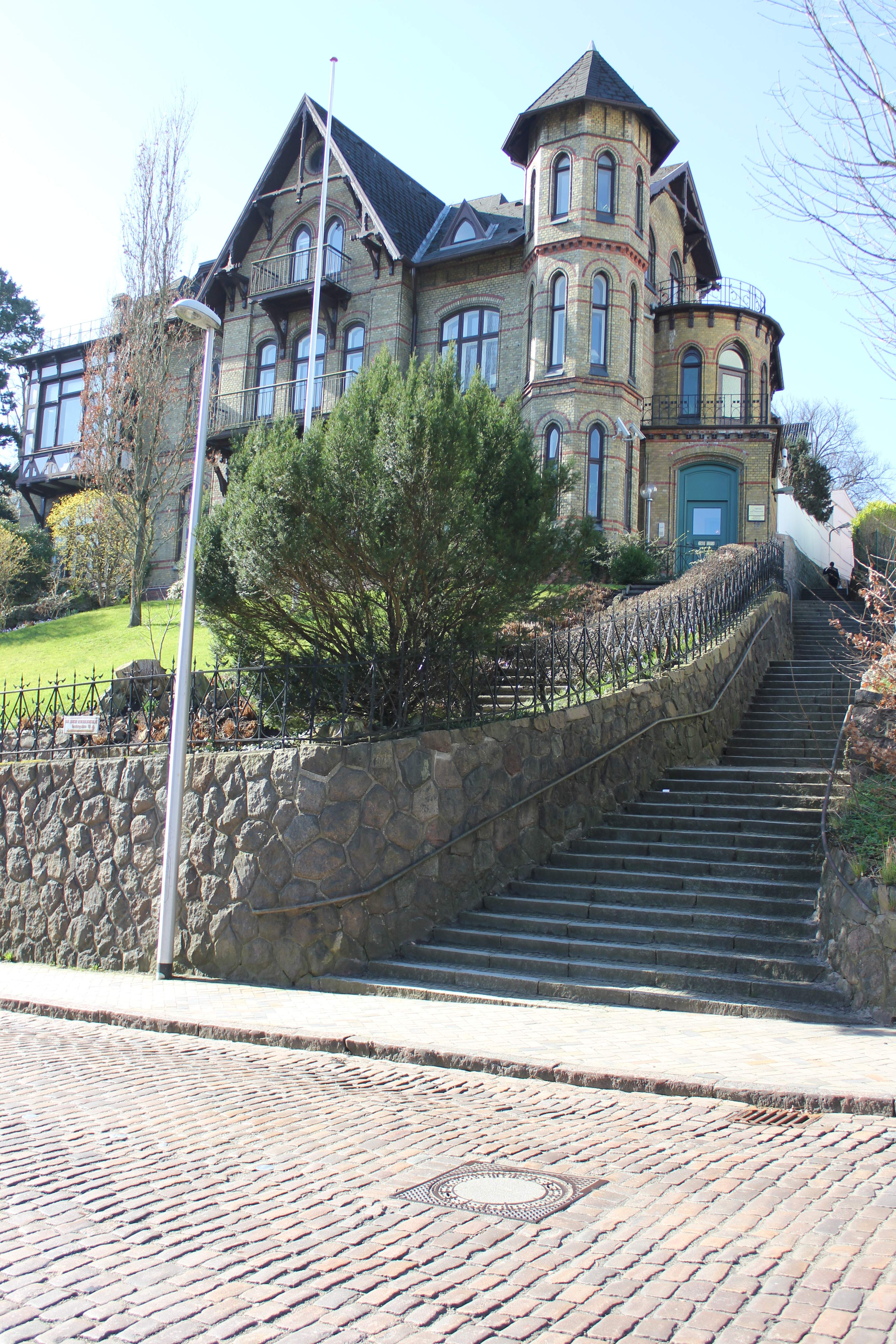 Burg Schöneck (Flensburg, Mürz 2014), Bild 02